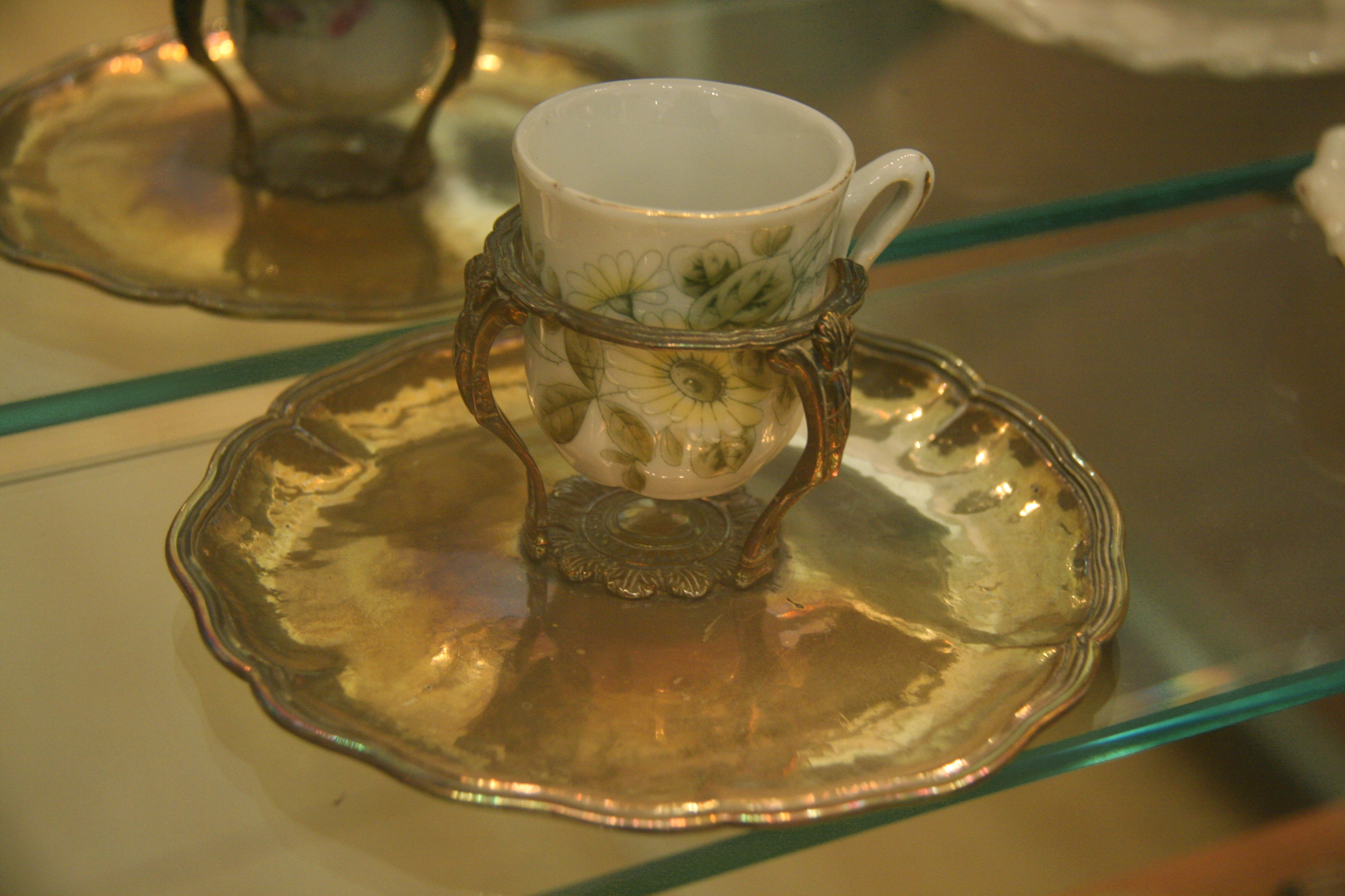 Macerina - Metálica